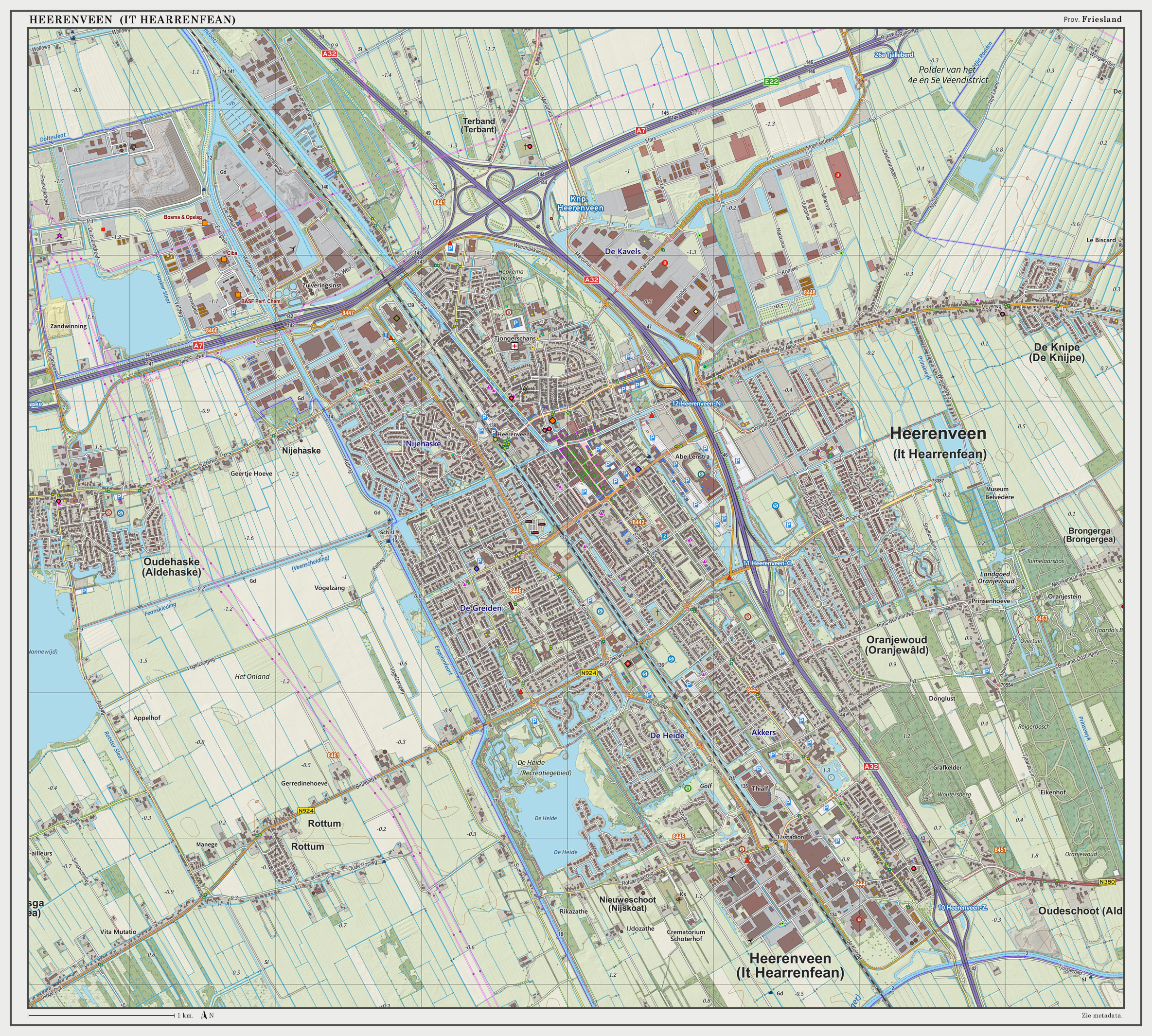 Topografische kaart van Heerenveen (woonplaats). Resolutie: 300 pixels/km. Kaartbeeld samengesteld uit de open geodata van de Top10NL en Top25namen (Basisregistratie Topografie, Kadaster), Creative Commons BY licentie. Gebouwvlakken uit open geodata BAG extract. Wegen uit de OpenStreetMap, OpenStreetMap community. Reliëfschaduw uit de Actuele Hoogtekaart AHN2. Samenstelling en kleurenschema: Jan-Willem van Aalst, met QGIS2. Zie ook de Legenda.